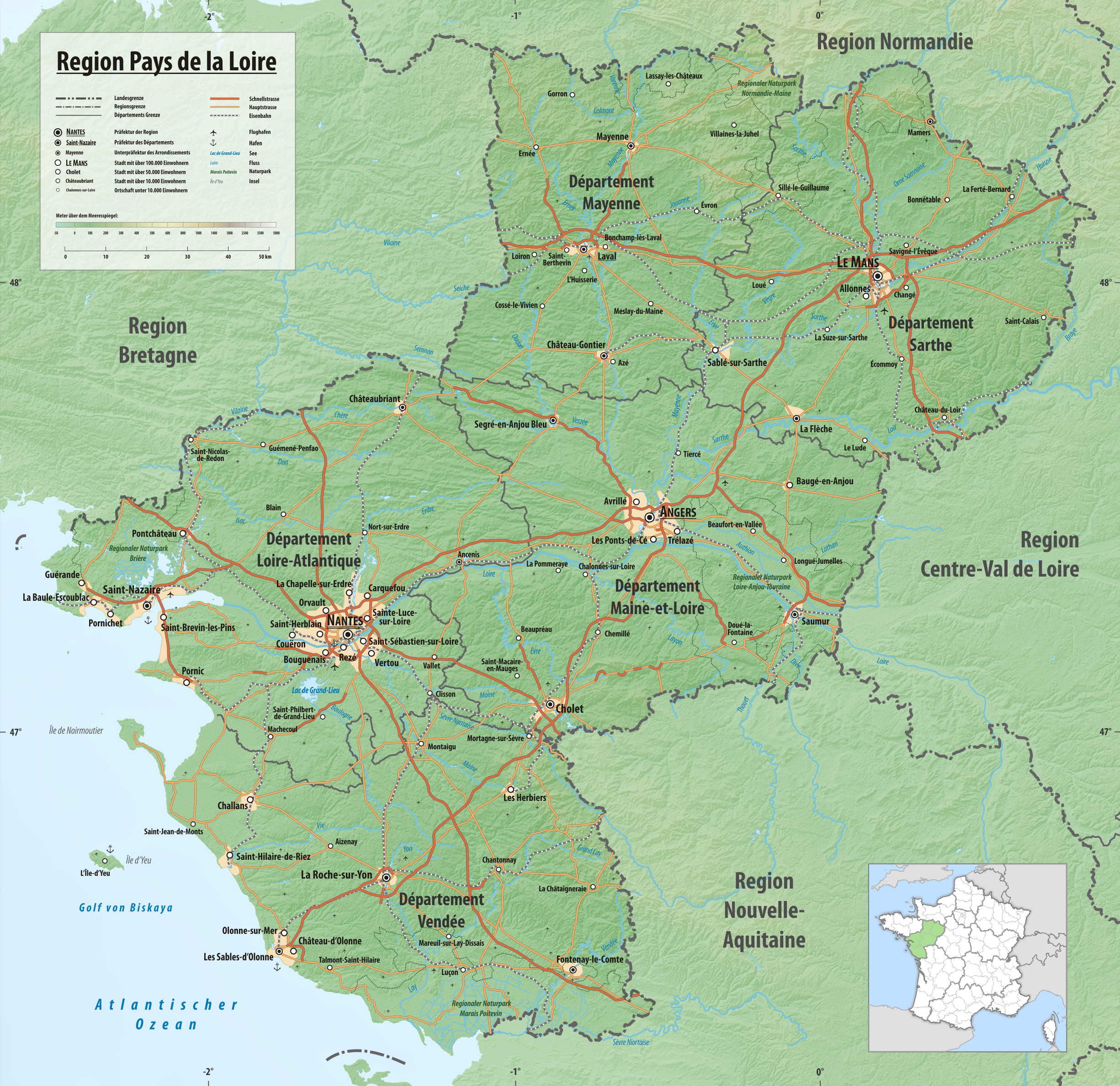 Reliefkarte der Region Pays_de_la_Loire Topographischer Hintergrund: NASA Shuttle Radar Topography Mission (public domain). SRTM3 v.2.